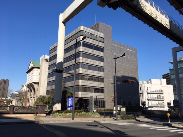 千葉県文書館 2019年3月24日撮影